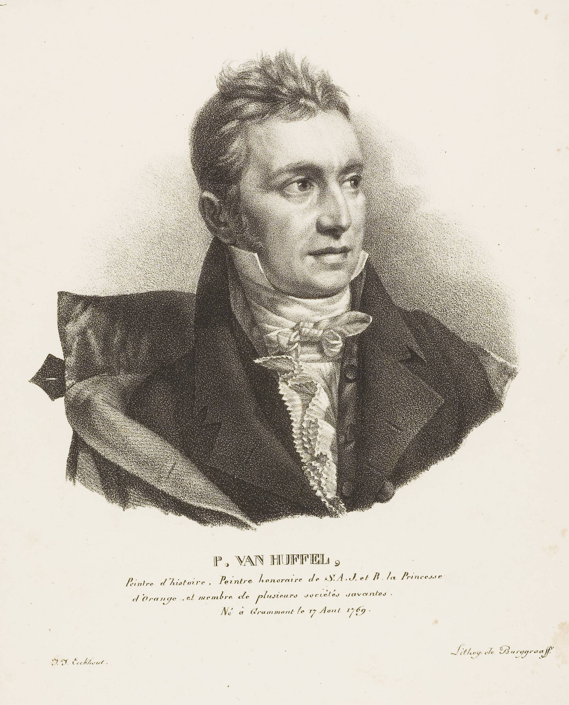 Portrait lithographié de P. Van Huffel extrait de J.-J. Eeckhout et G.-P. Van den Burggraaff, Collection de portraits des artistes modernes nés dans le Royaume des Pays-Bas, Bruxelles, 1822.